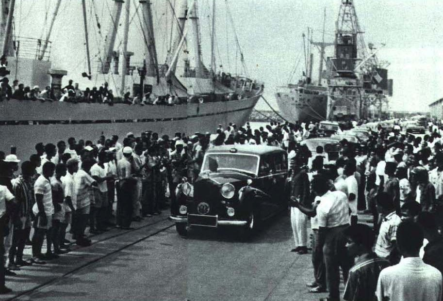 1964-04 1964年 中国访问加纳 周恩来陈毅到加纳特马